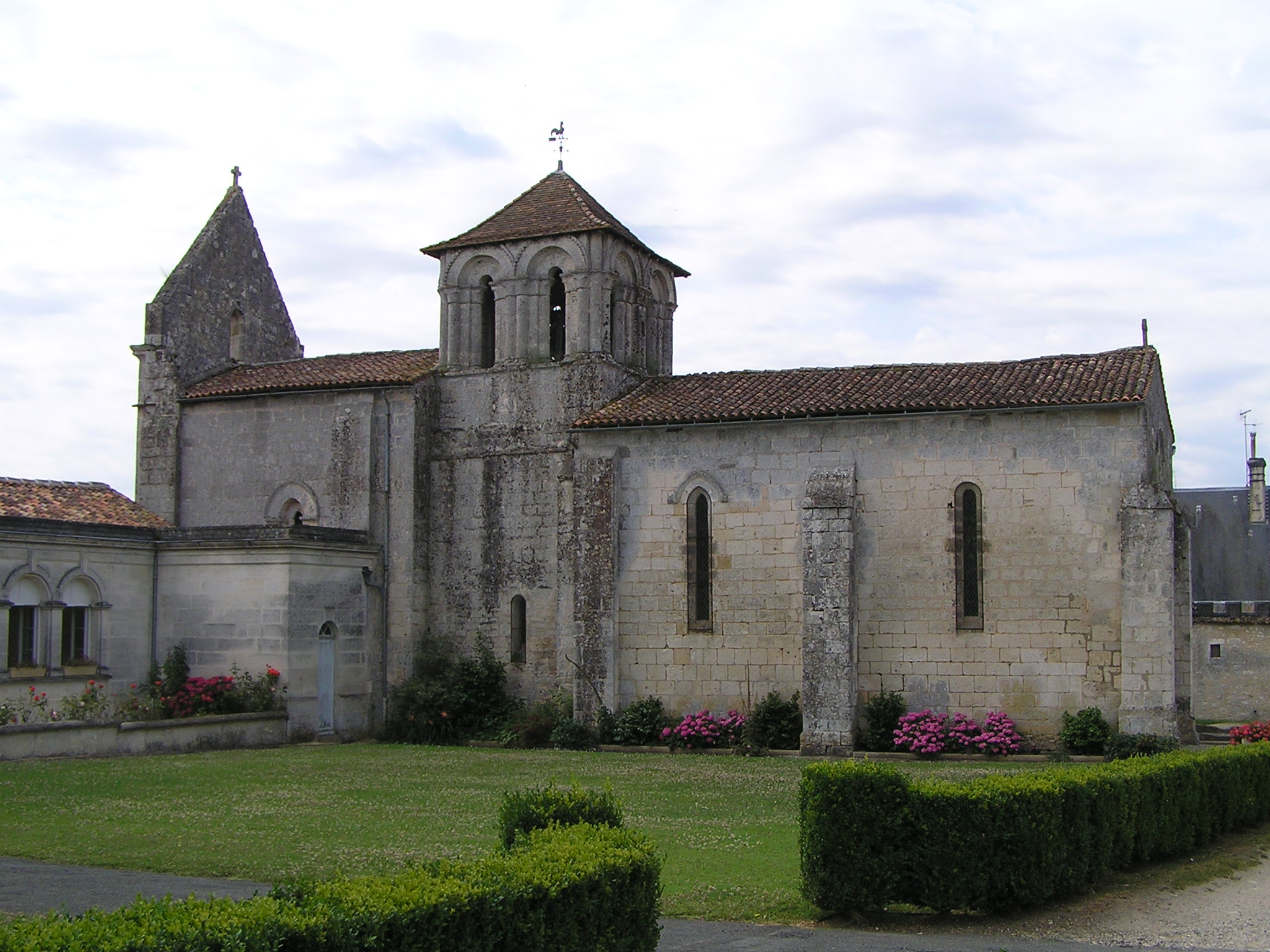 église de Saint-Brice, Charente, France